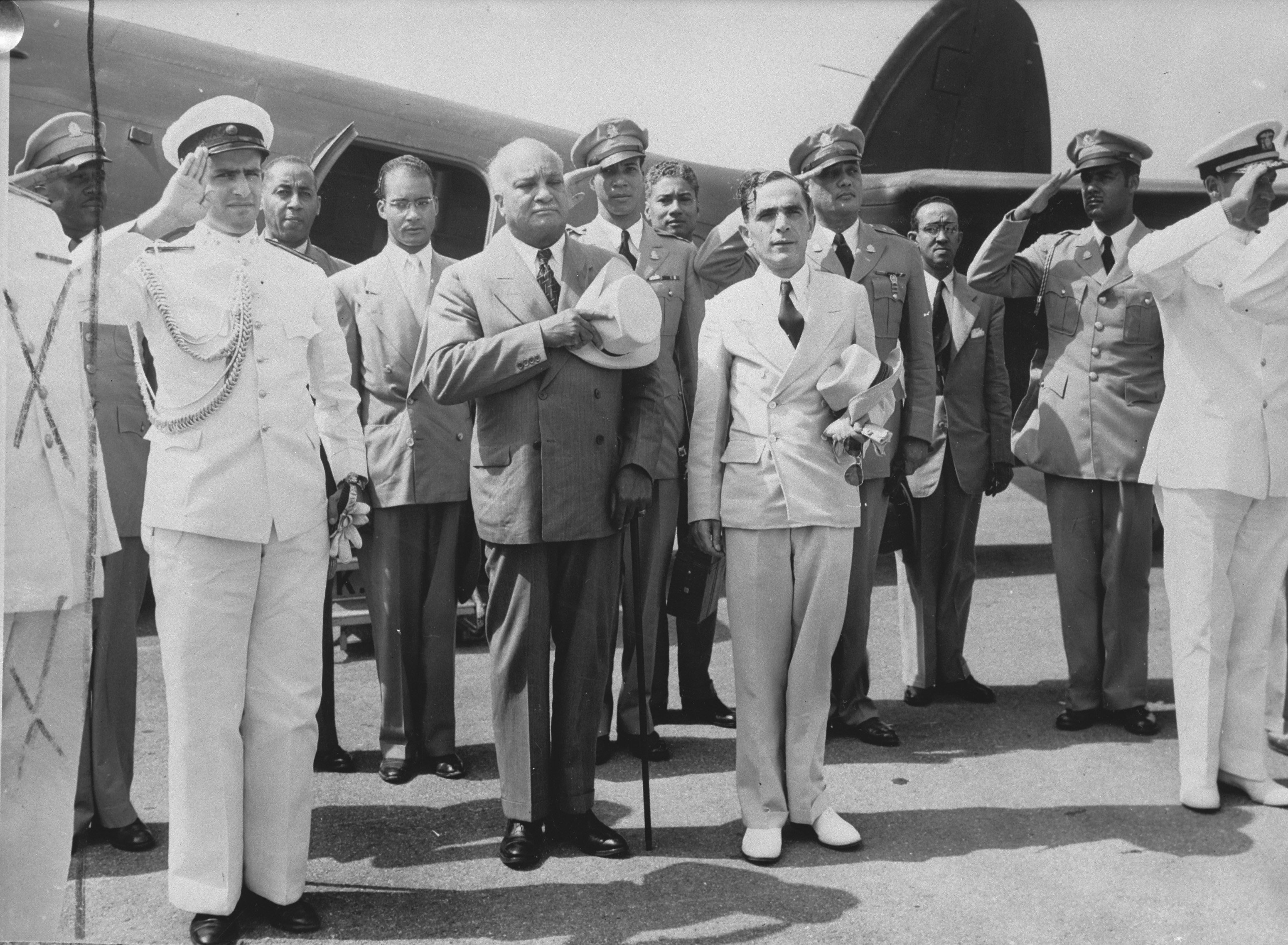 Collectie / Archief : Fotocollectie Anefo Reportage / Serie : Wi [West Indies] / Anefo Londen serie Beschrijving : President Elie Lescot van Haïti op Curaçao wordt op vliegveld Hato ontvangen door gouverneur P. Kasteel Annotatie : Repronegatief Datum : {1940-1945} Locatie : Curacao Trefwoorden : gouverneurs, presidenten, tweede wereldoorlog, vliegtuigen Persoonsnaam : Kasteel, P.A., Lescot, Elie Fotograaf : Onbekend / Publiek Domein, [onbekend] Auteursrechthebbende : Nationaal Archief Materiaalsoort : Negatief (zwart/wit) Nummer archiefinventaris : bekijk toegang 2.24.01.04 Bestanddeelnummer : 935-1574